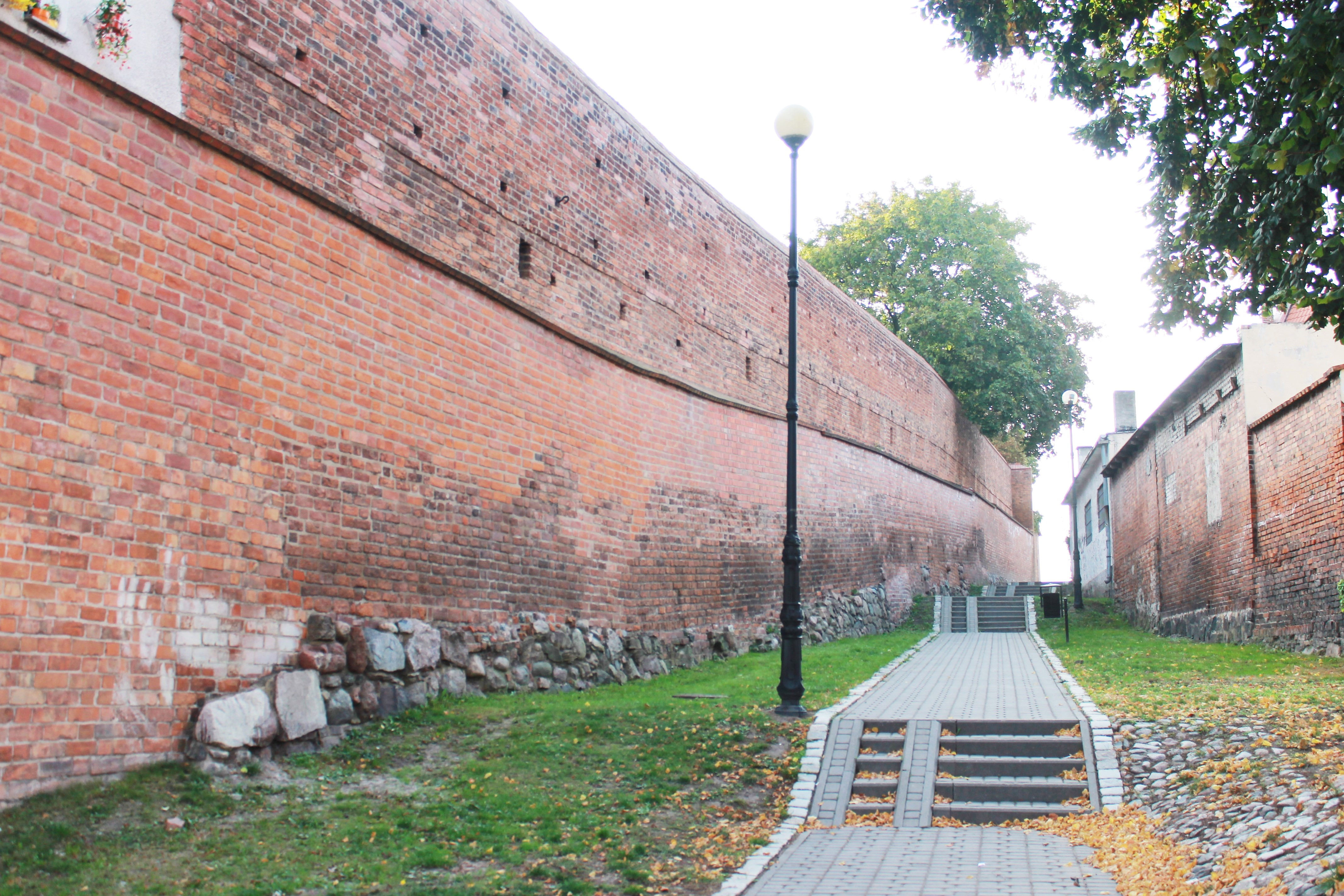 Chełmno, zespół murów miejskich